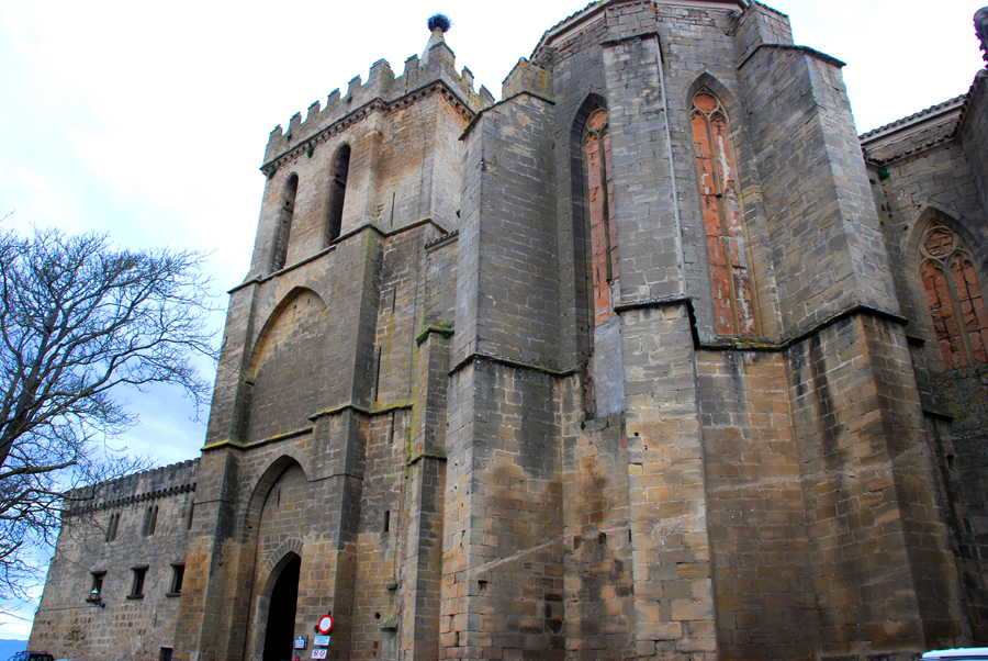 iglesia de San Juan, Laguardia